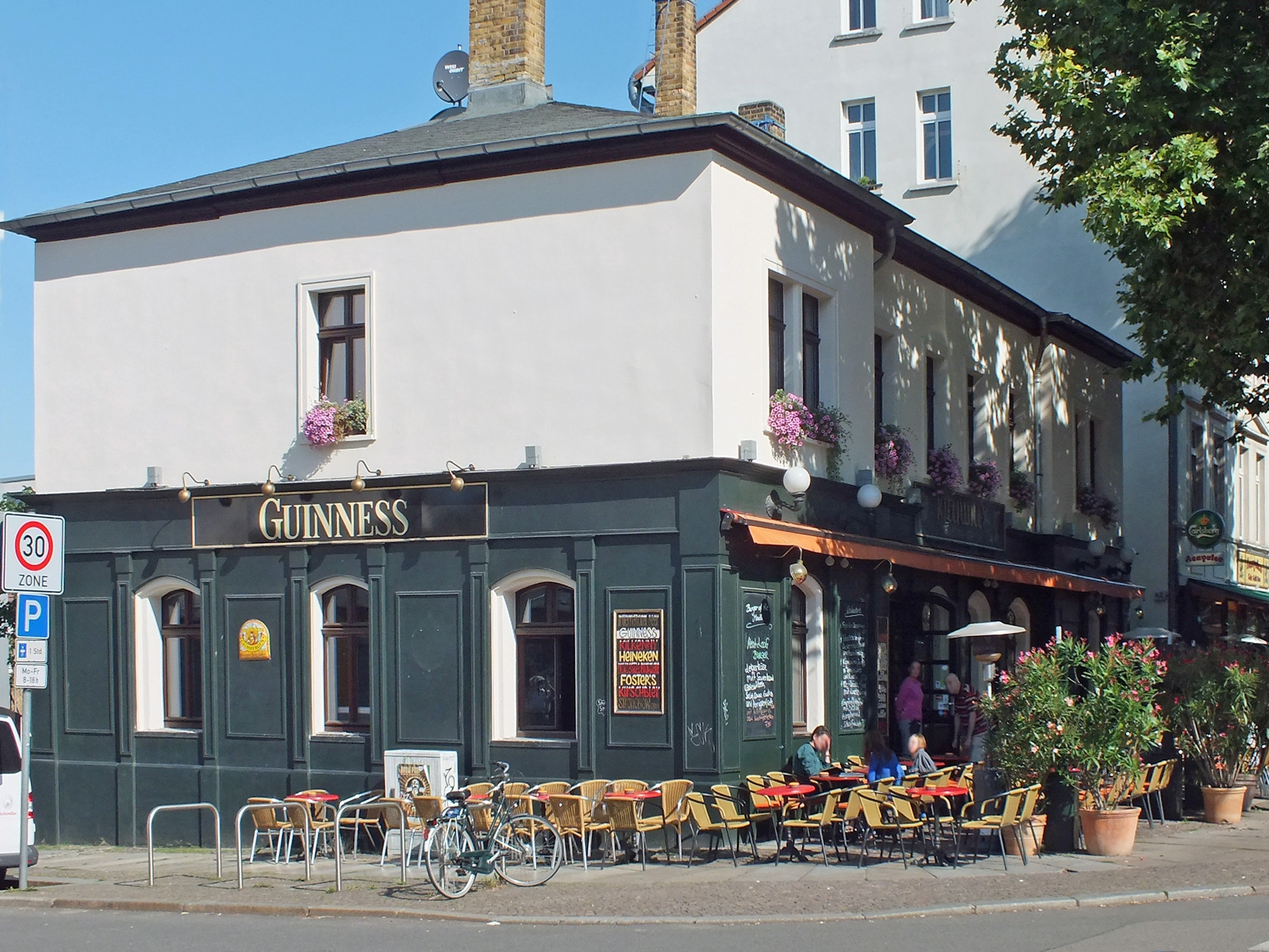 Leipzig, Karl-Liebknecht-Straße 44, ehemaliges Wachgebäude an der alten Stadtgrenze